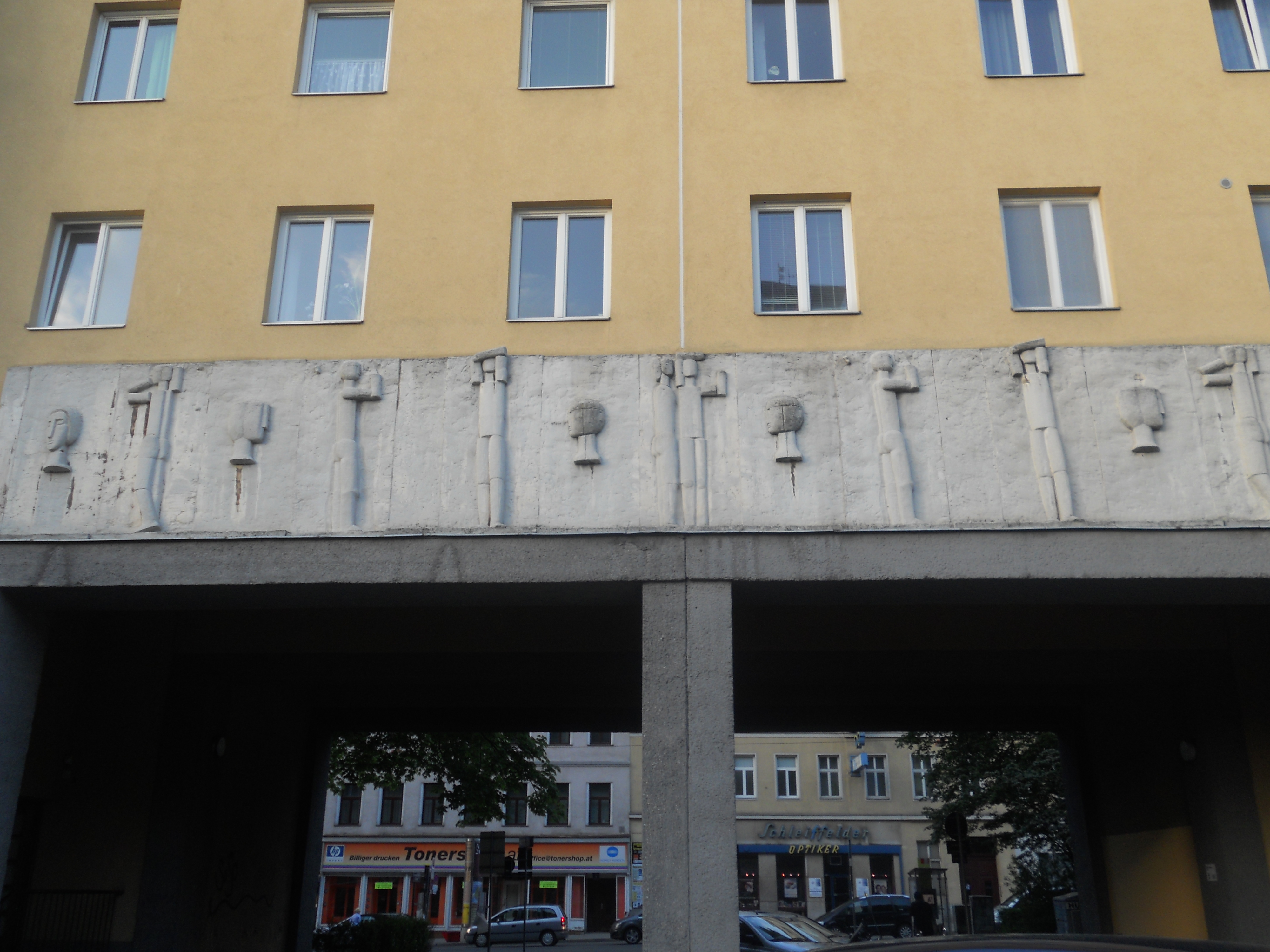 Hauszeichen, Plastik (Wotruba-Fries auf der straßenabgewandten Seite der Hauseinfahrt Reinprechtsdorfer Straße 1c)